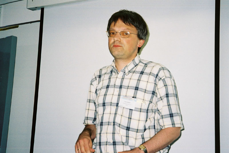 Foto van Arno Kuijlaars